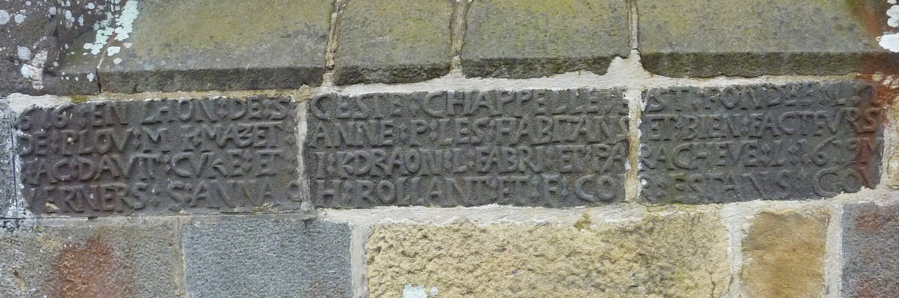 Plougastel-Daoulas : chapelle Saint-Adrien, inscription mur extérieur arrière (chevet) de la chapelle